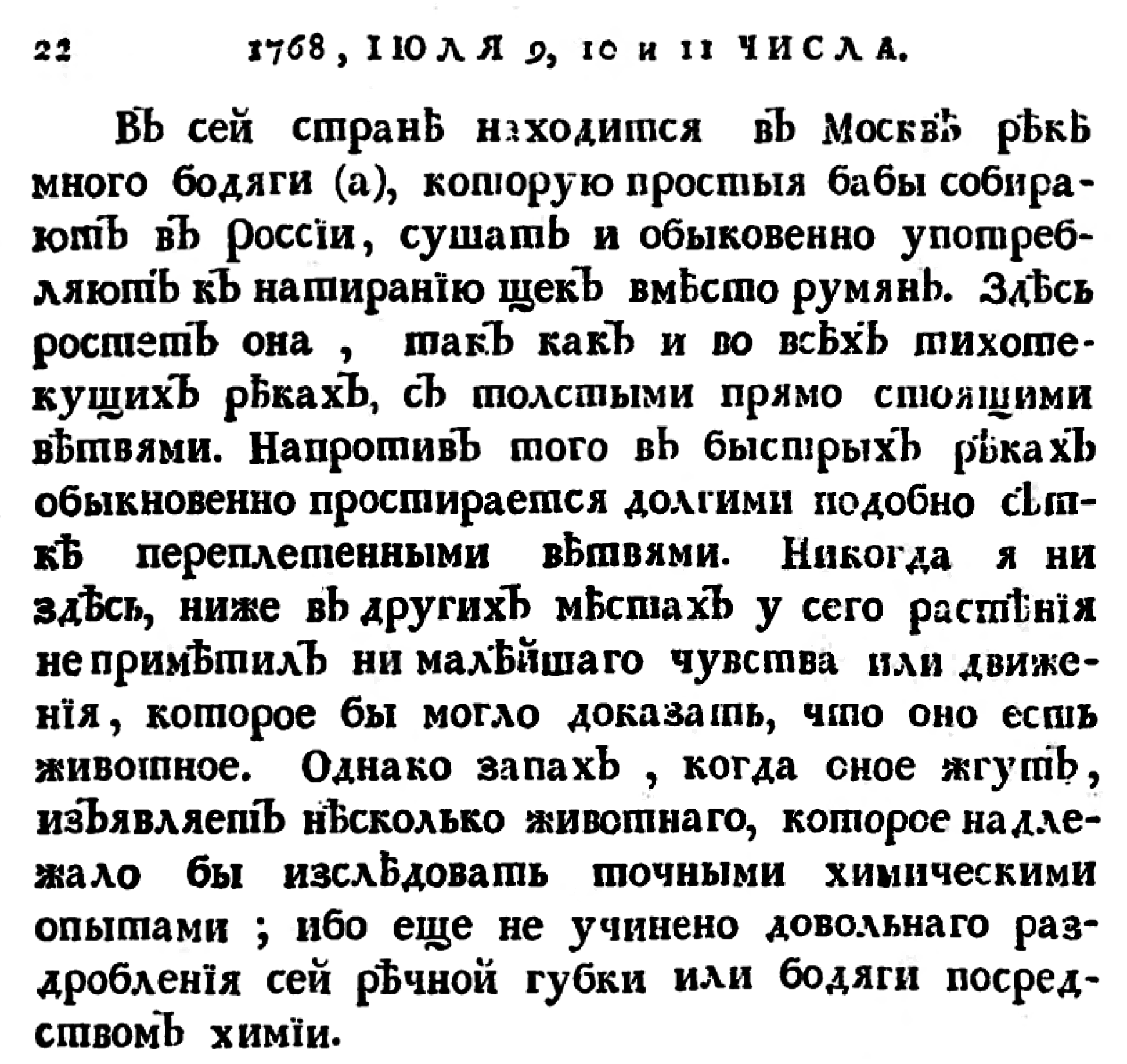 Первое научное описание бодяги в России.